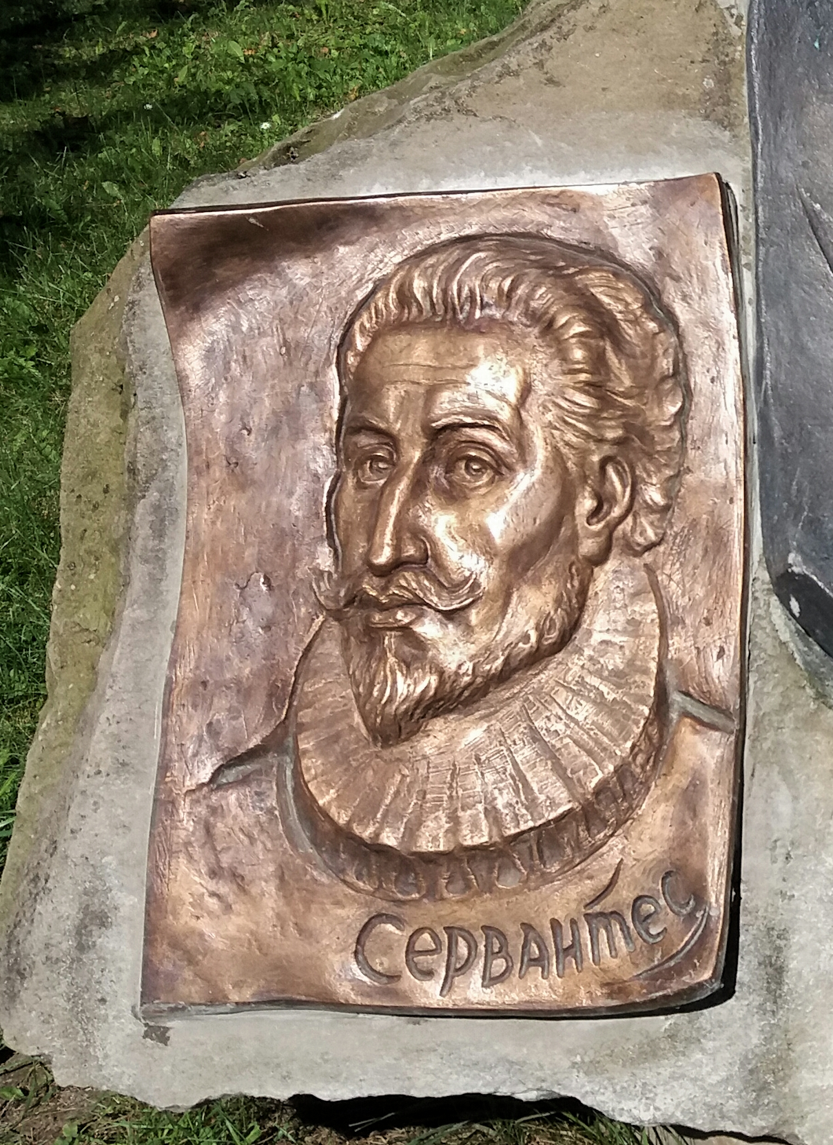 Reserva histórico cultural del Estado ucraniano en Nahuievychi, pueblo natal de Iván Frankó en la región de Lviv.